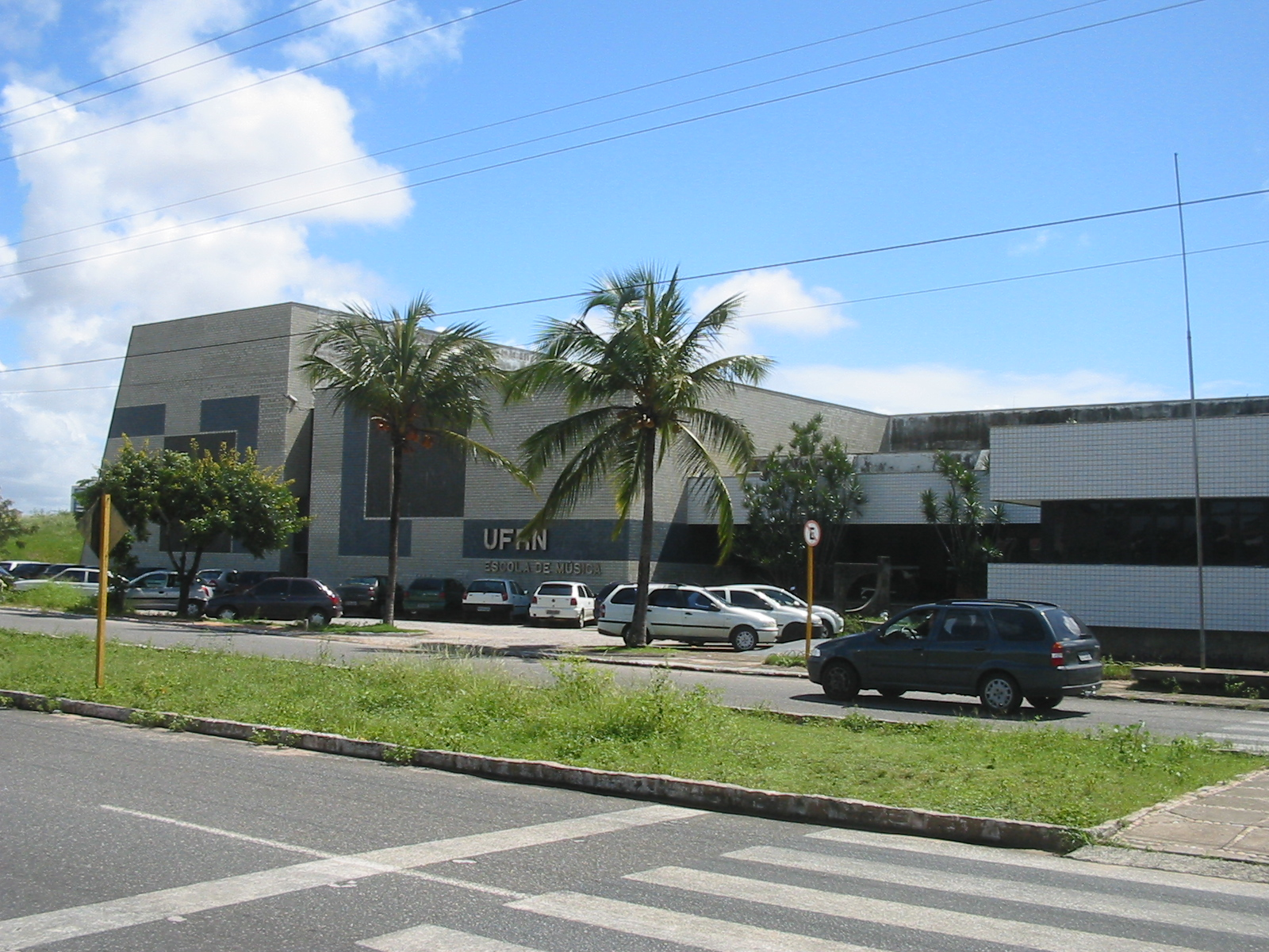 Natal (Rio Grande do Norte), Brasil. Escola de Música da Universidade Federal (UFRN). Natal, Brazil. UFRN.